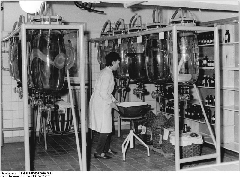 Greifswald, Universitätsapotheke, Arzneilager Zentralbild Lehmann 4.5.1966 Zu den Einrichtungen der Ernst-Moritz-Arndt-Universität in Greifswald gehört u.a. die Universitätsapotheke. Im Arzneikeller werden Vorräte aufbewahrt, die bei Bedarf ausgegeben werden. Hier Apothekenhelferin Gisela Krienke beim Abfüllen einer Lösung.